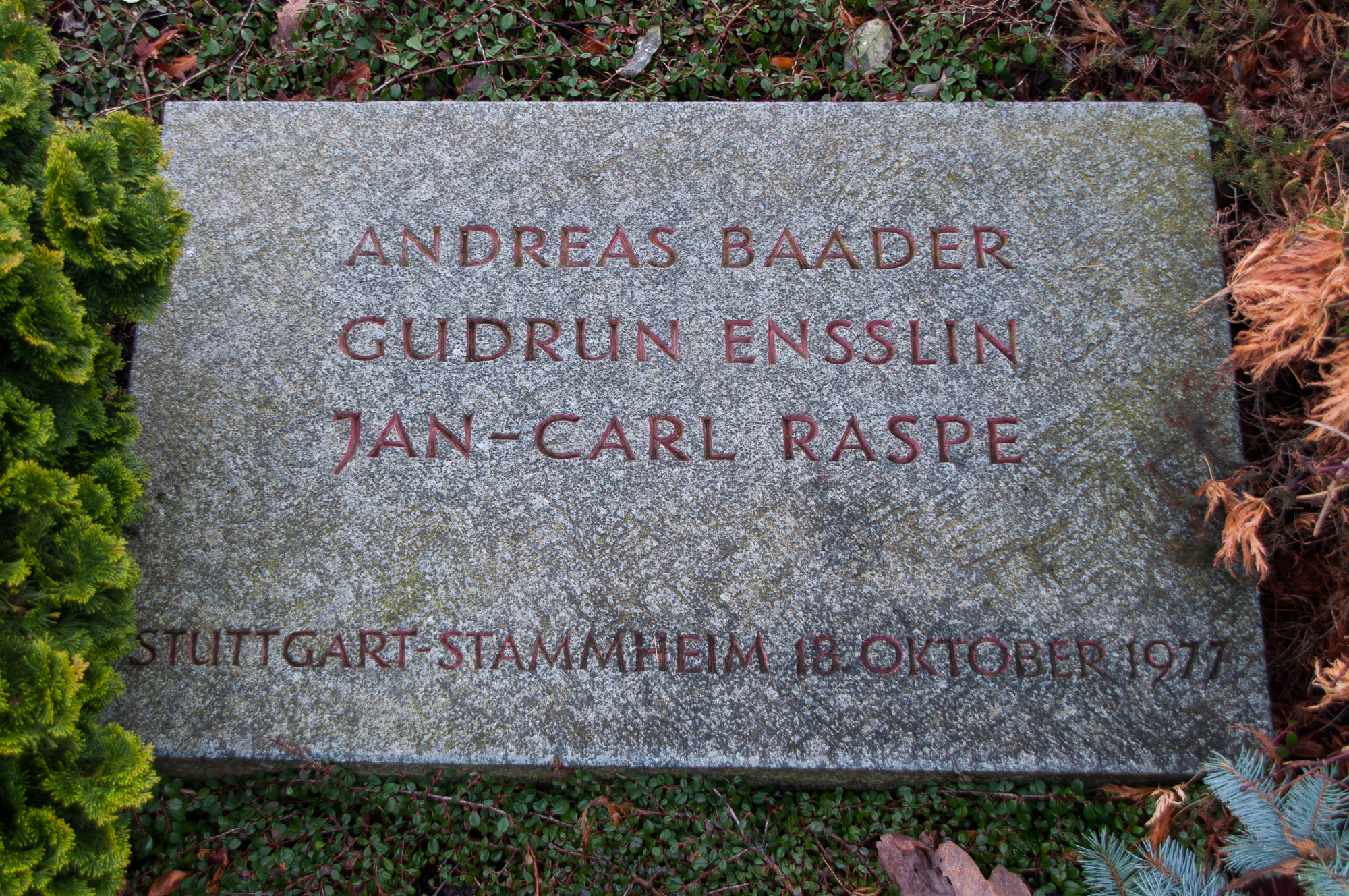 Grabstein des Gemeinschaftsgrabs von Andreas Baader, Gudrun Ensslin und Jan-Carl Raspe auf dem Dornhaldenfriedhof in Stuttgart-Degerloch.